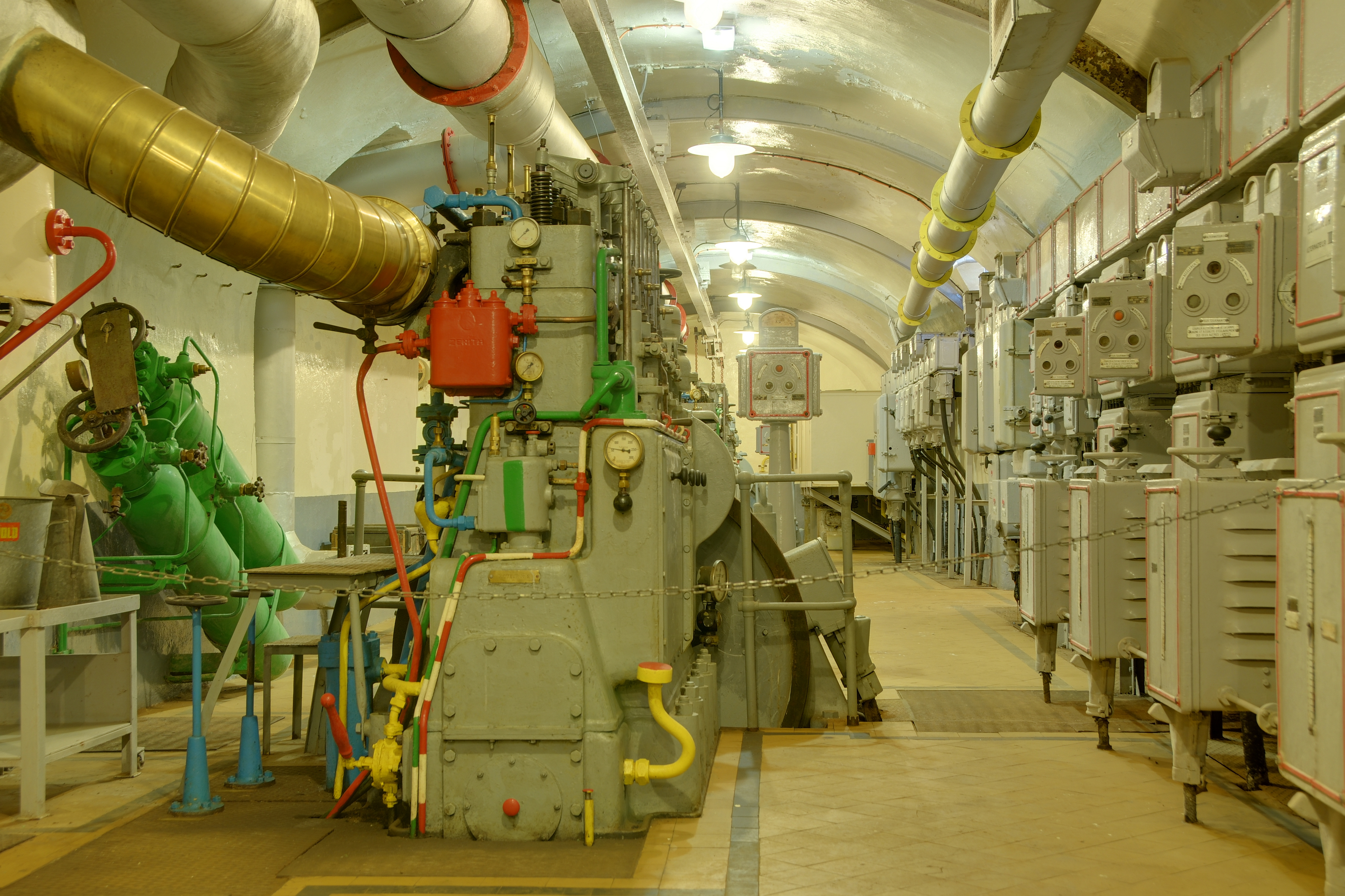 Dans l'usine : salle des groupes électrogènes. (HDR).